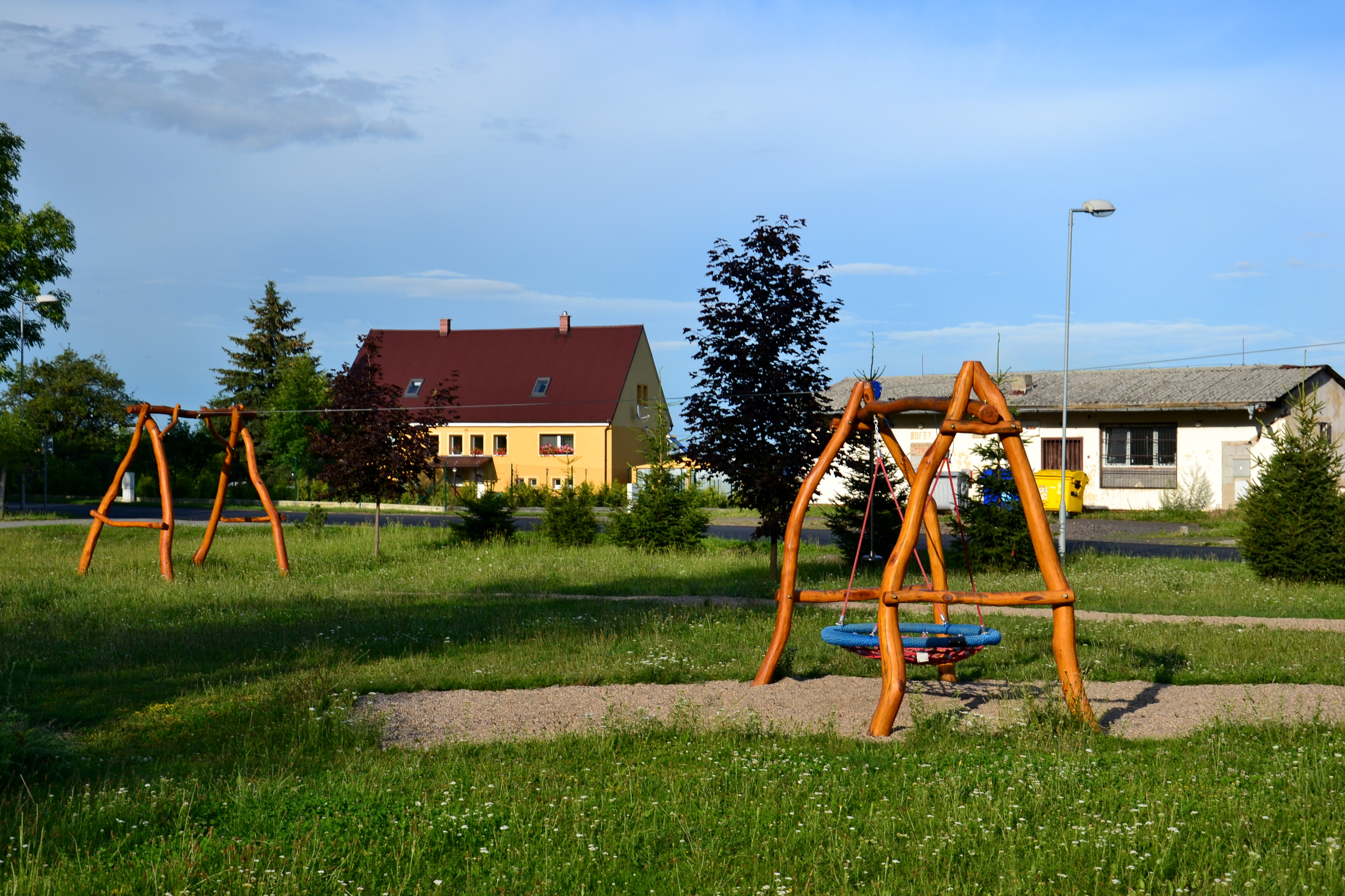 Náves ve Všehrdech u Chomutova